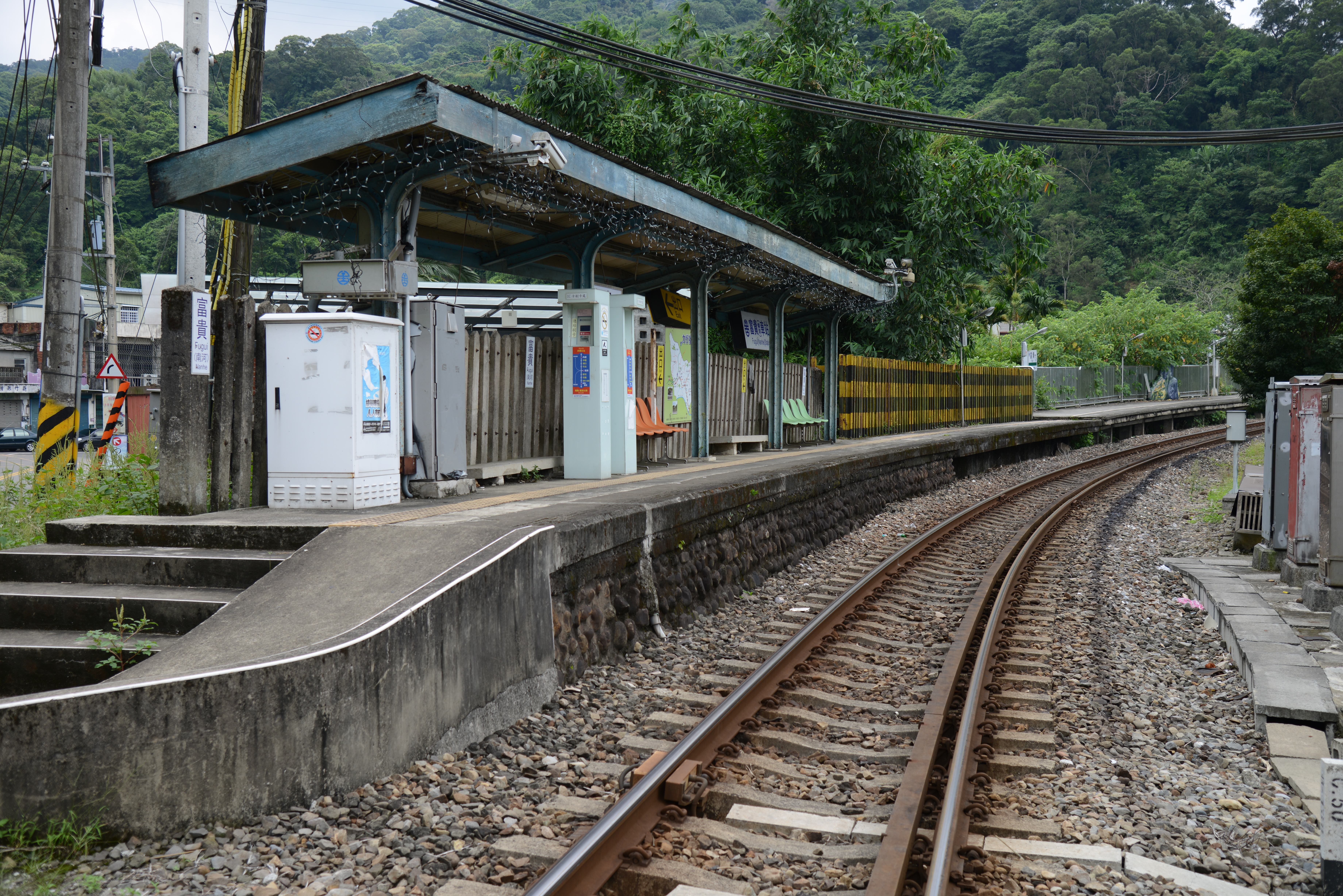 臺灣鐵路管理局富貴車站。